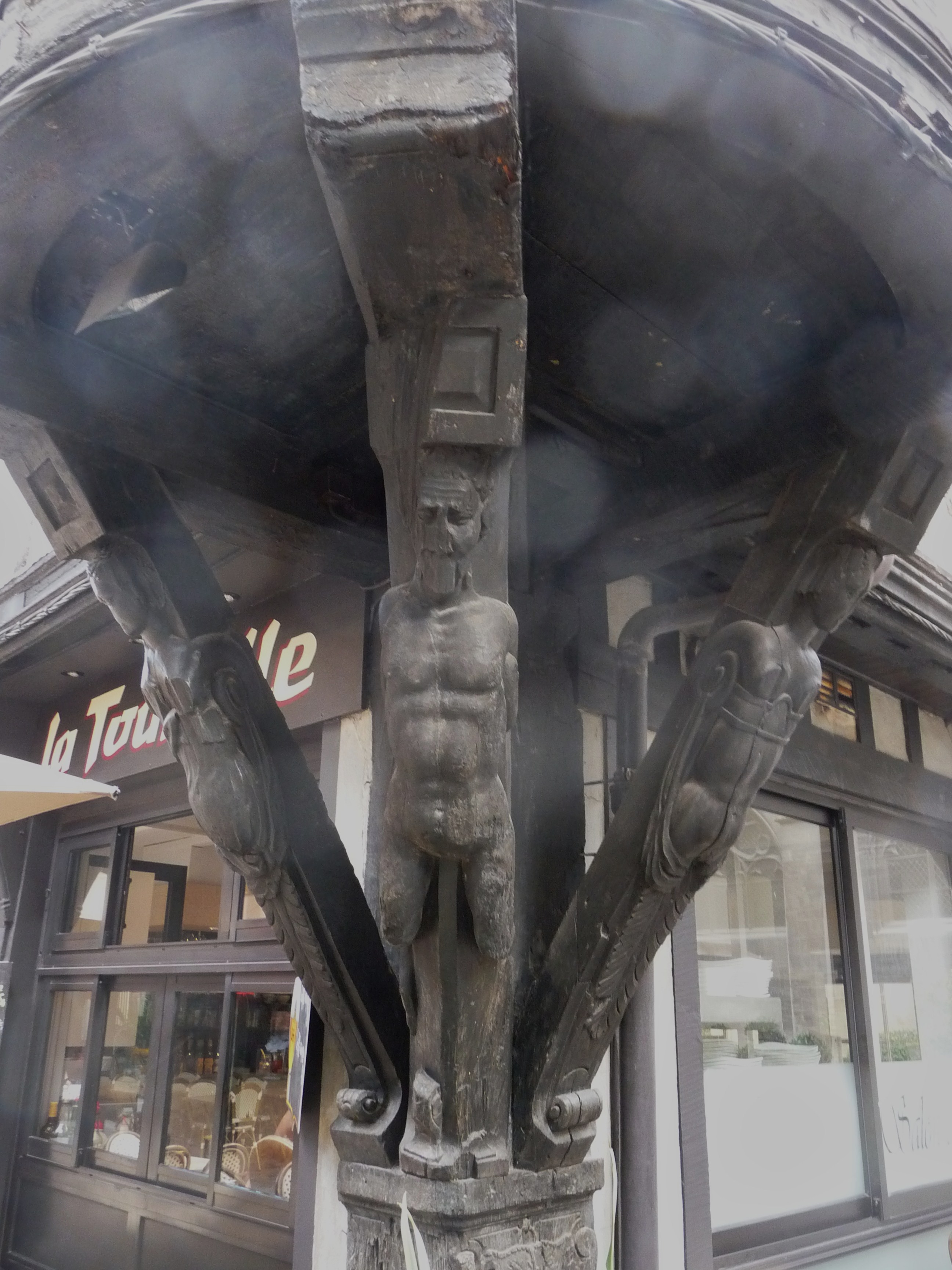 . Cariatides servant de soubassement à la Maison à Tourelle dite " de l'Orfèvre" , rue Champeaux à Troyes.